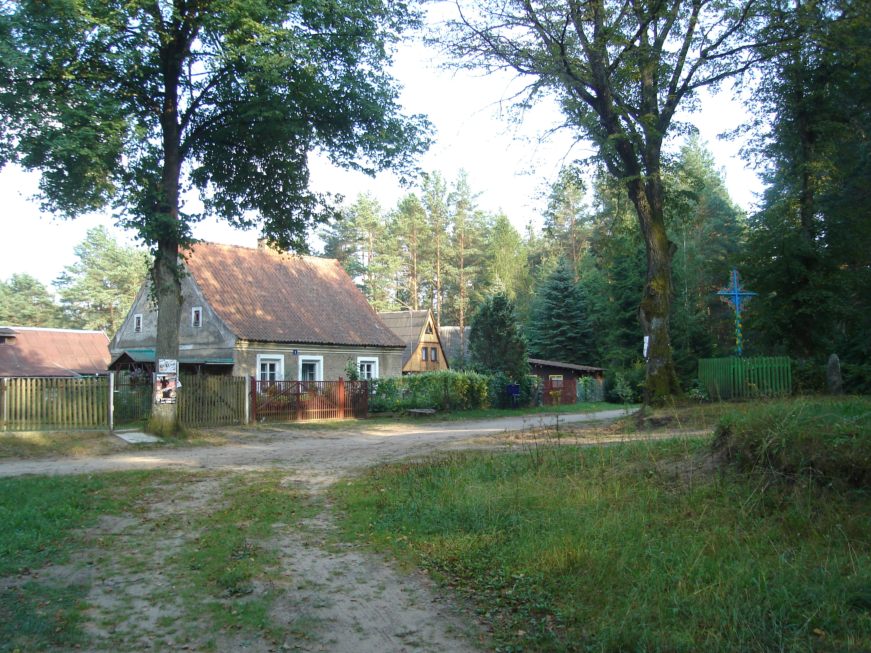 Wieś Połom w gminie Świętajno, powiat szczycieński